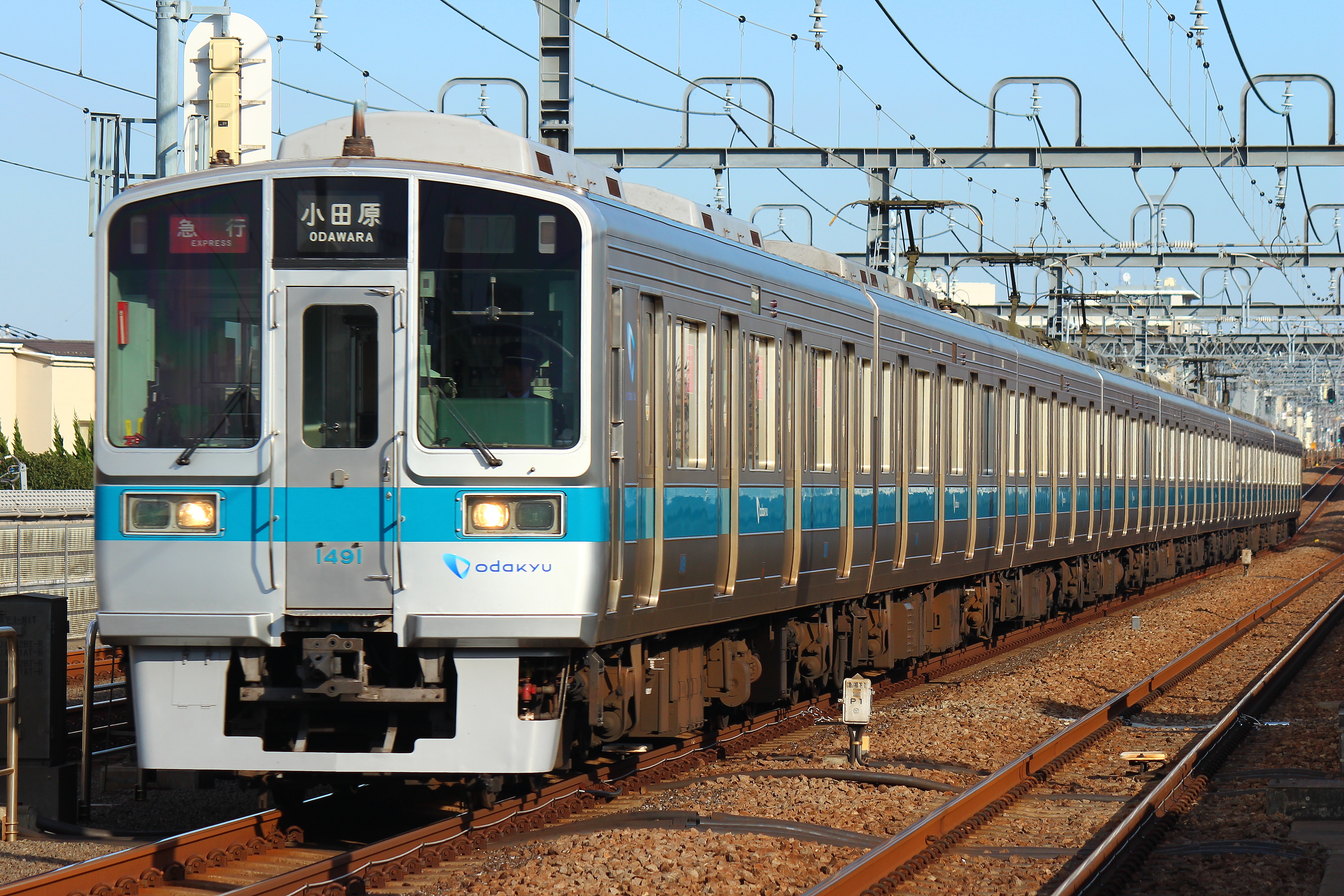 小田急1000形